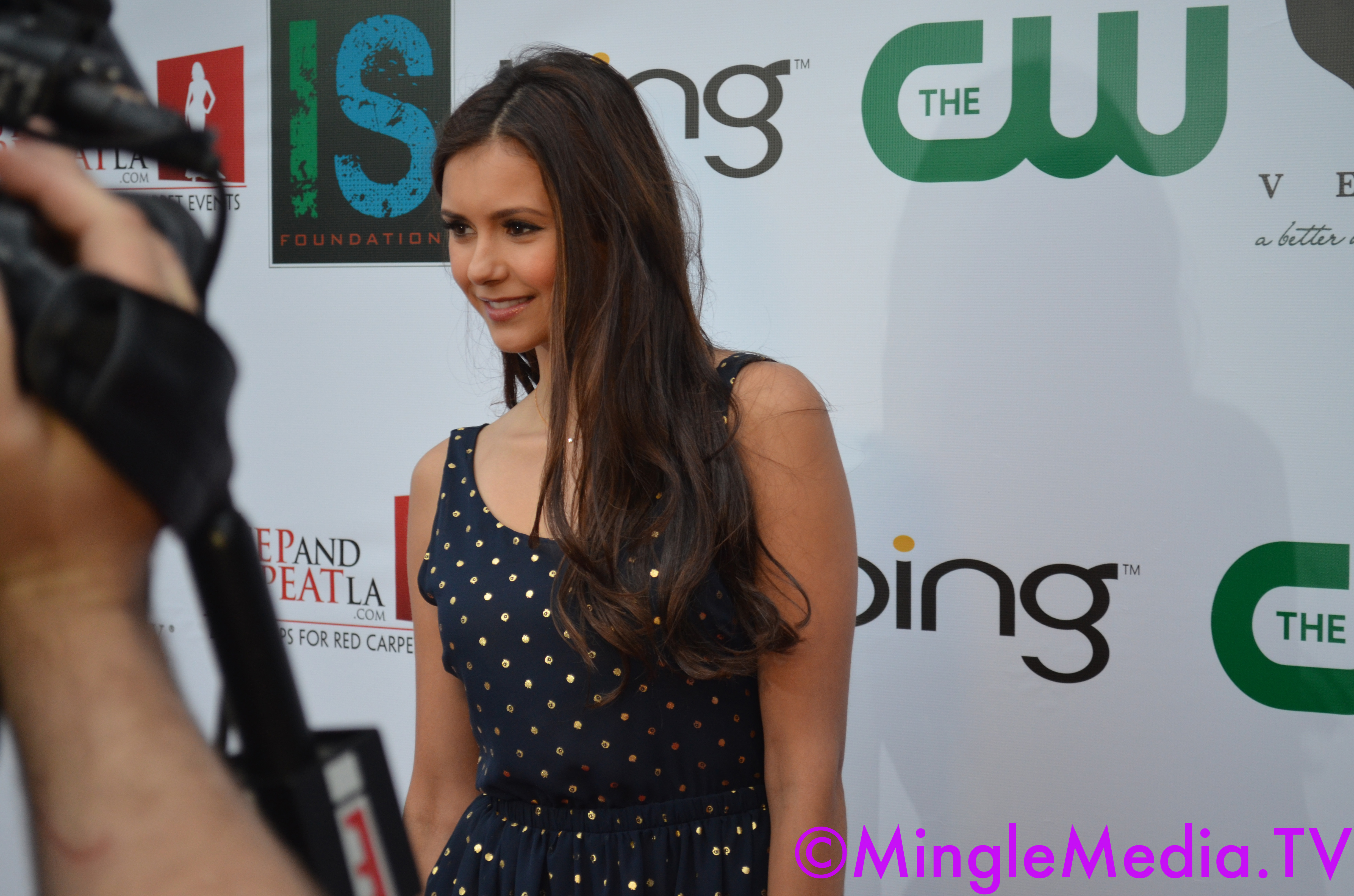 Nina Dobrev - DSC_0132